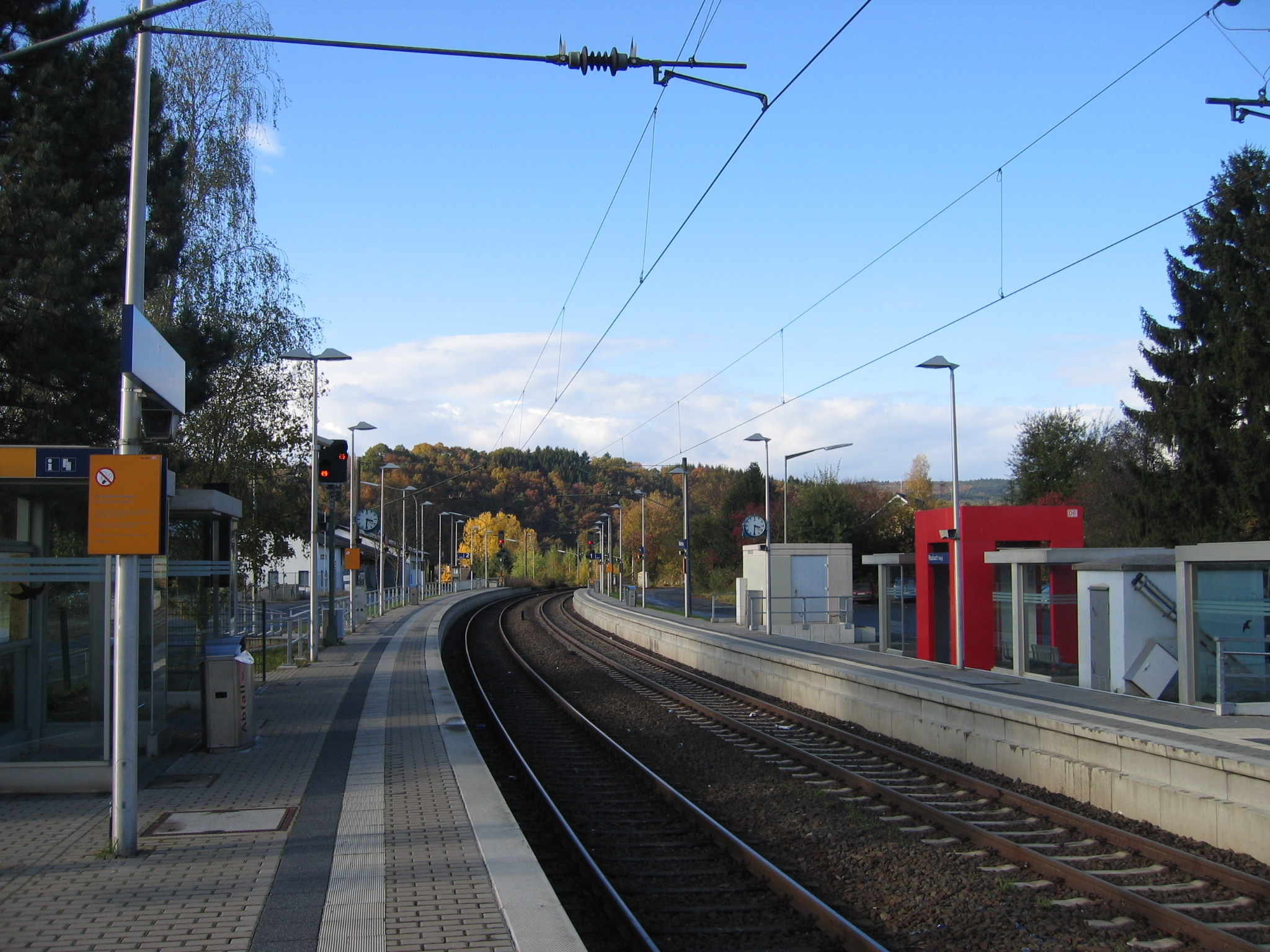 S-Bahnhof Rosbach an der Siegstrecke